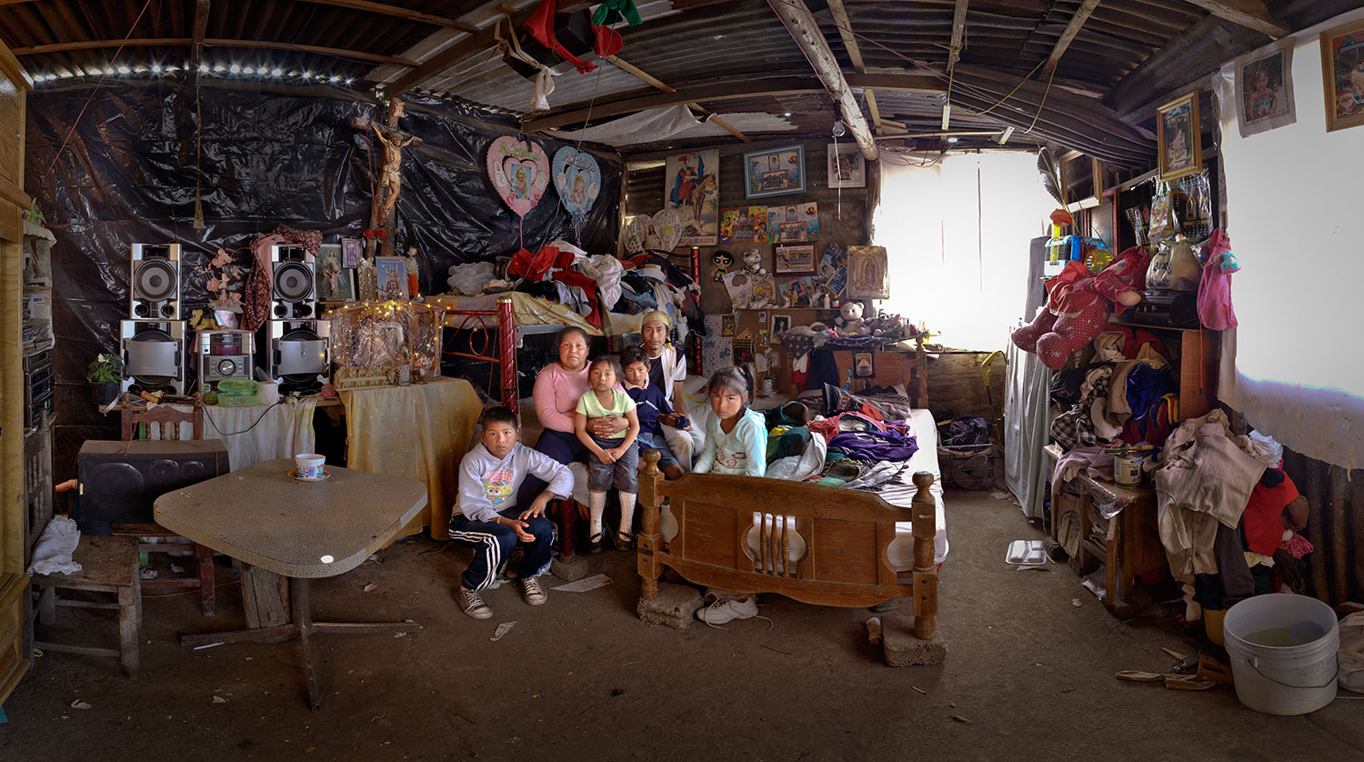 Fotografía de Andy Goldstein, perteneciente a su serie "Vivir en la tierra". Tomada en San Juan Tepecoculco, México en 2011.